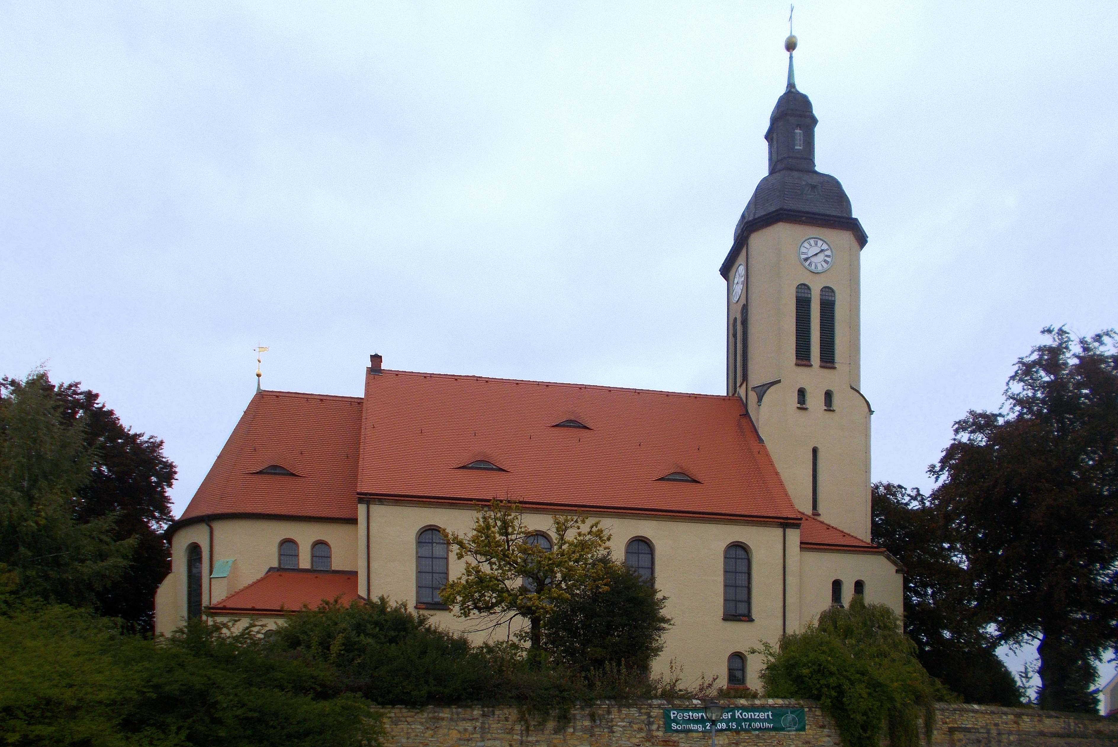 Blick vom Süden auf die Jakobuskirche Pesterwitz